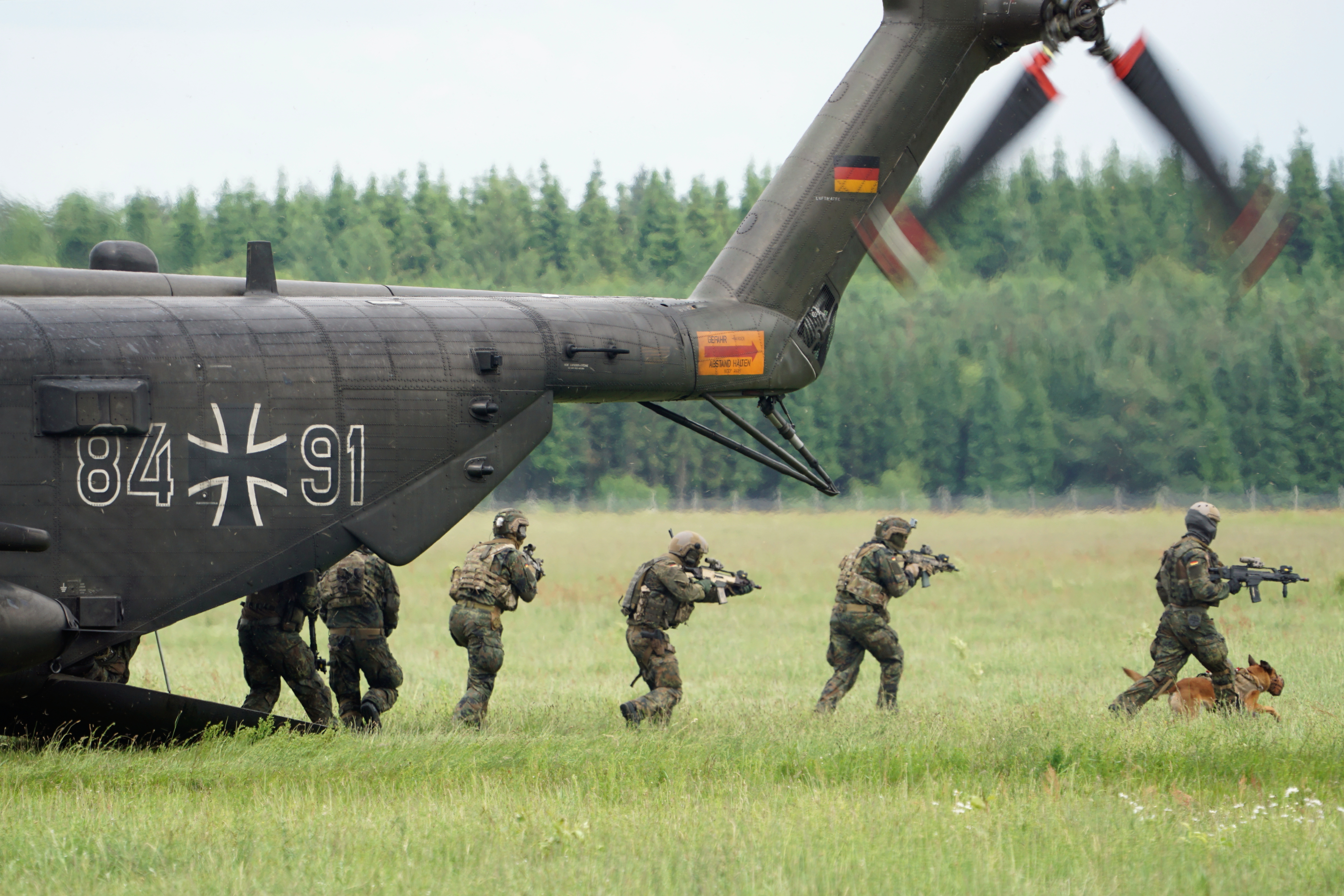 Aufgenommen am Tag der Bundeswehr 2017 auf dem Heeresflugplatz Faßberg.